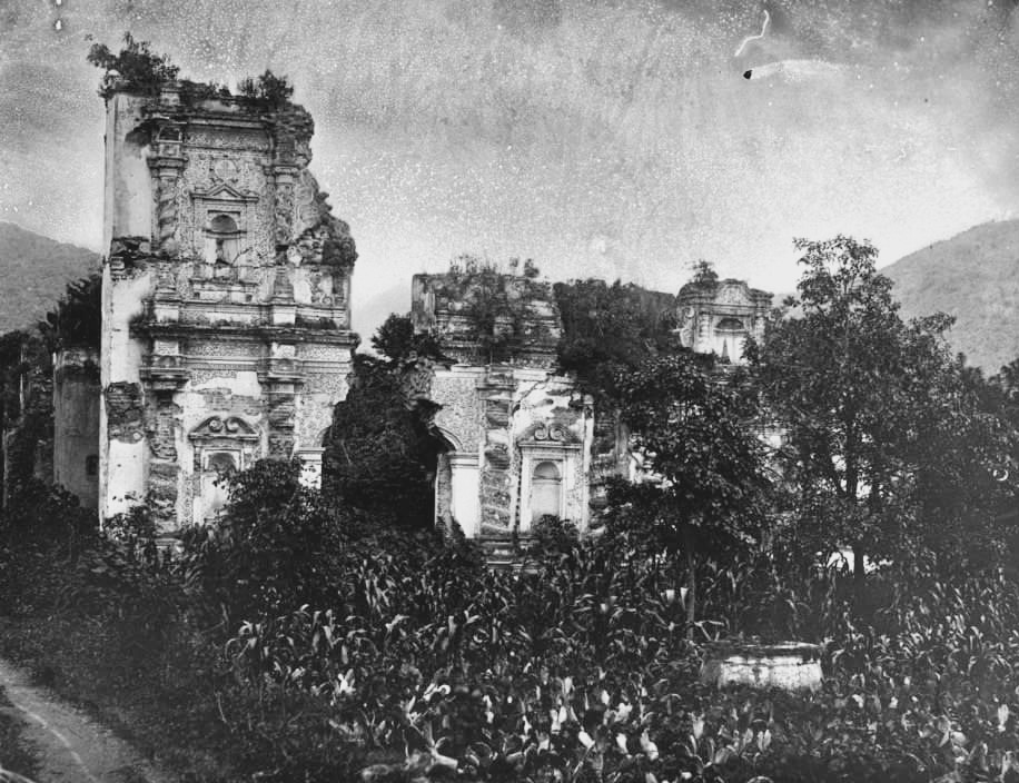 Parroquia de Candelaria en 1900. Colección de Ana Aguirre.